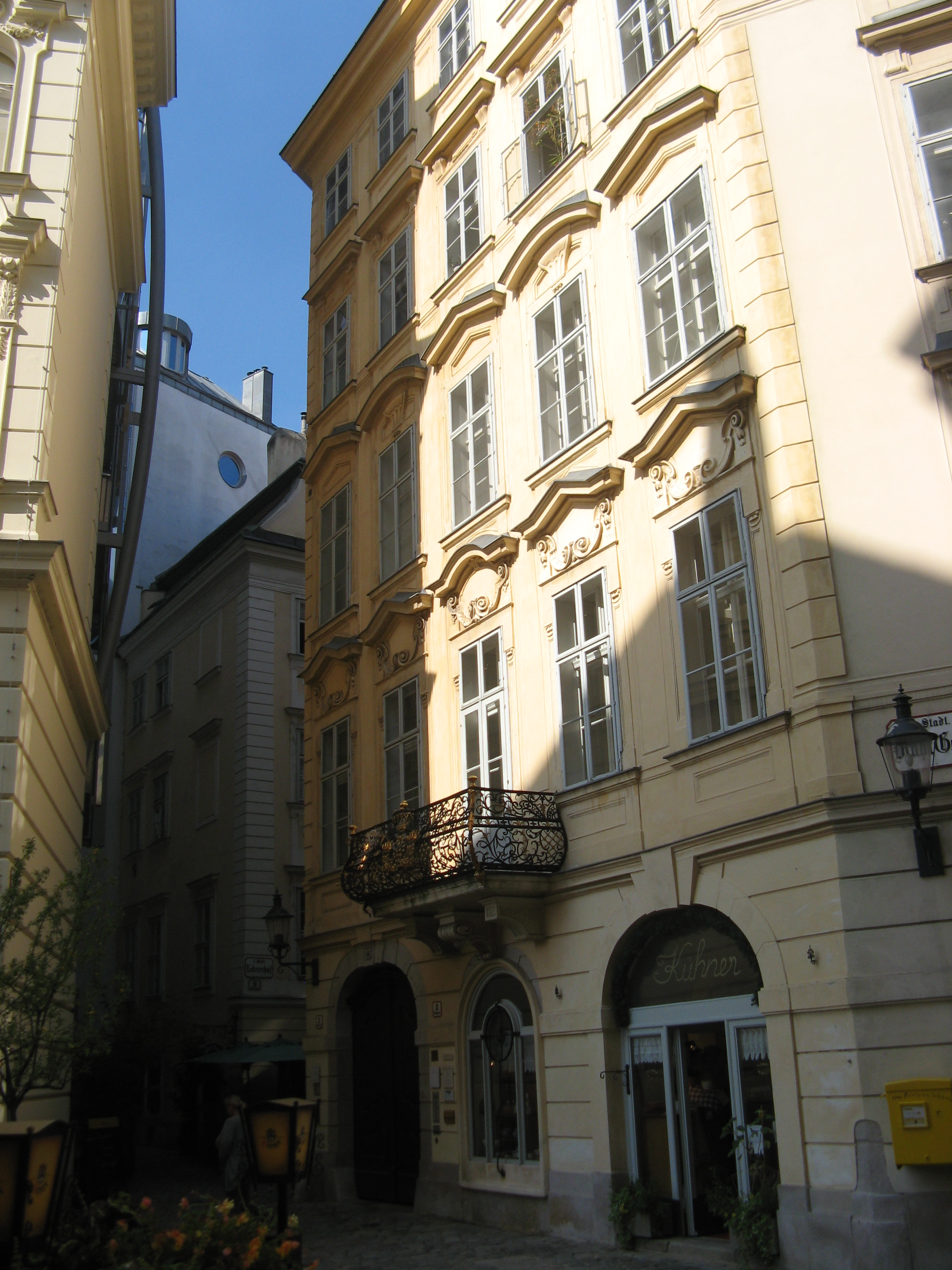 Drahtgasse 3 (1724), Wien-Innere Stadt